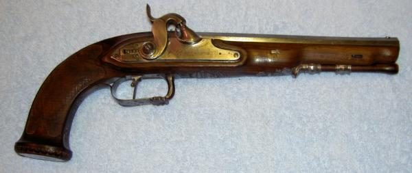 photo d'un pistolet a percussion (ou dit à piston) ici un modèle fabriqué par Berleur Guillaume photo personnelle libre de droit